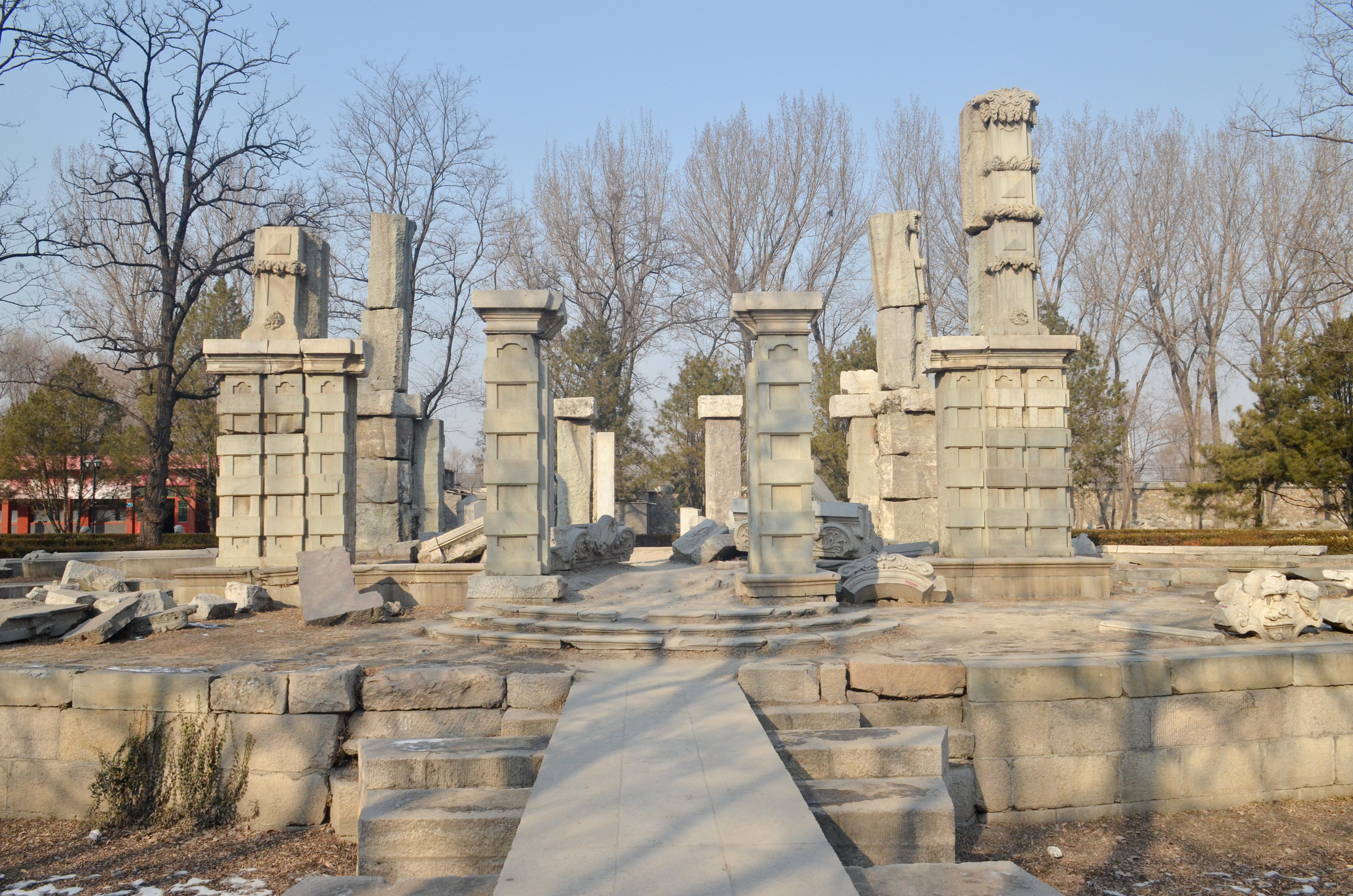 中文（中国大陆）: 方外观遗址, 原是一座坐北朝南的西式两层楼.